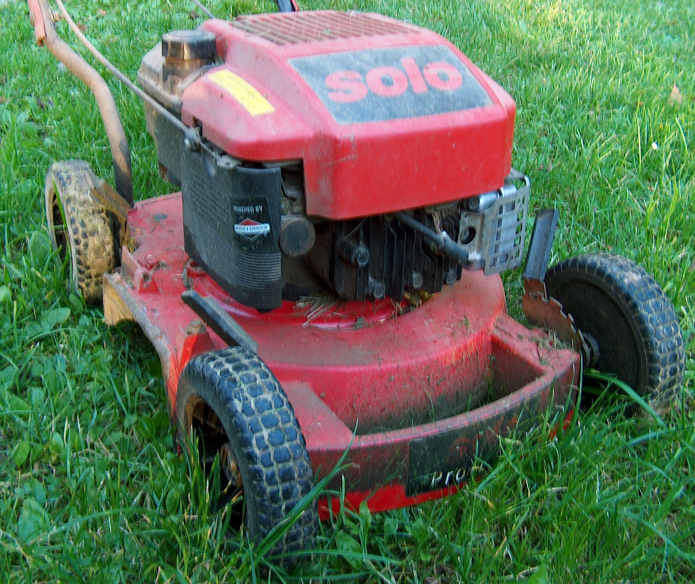 Rasenmäher Solo 554